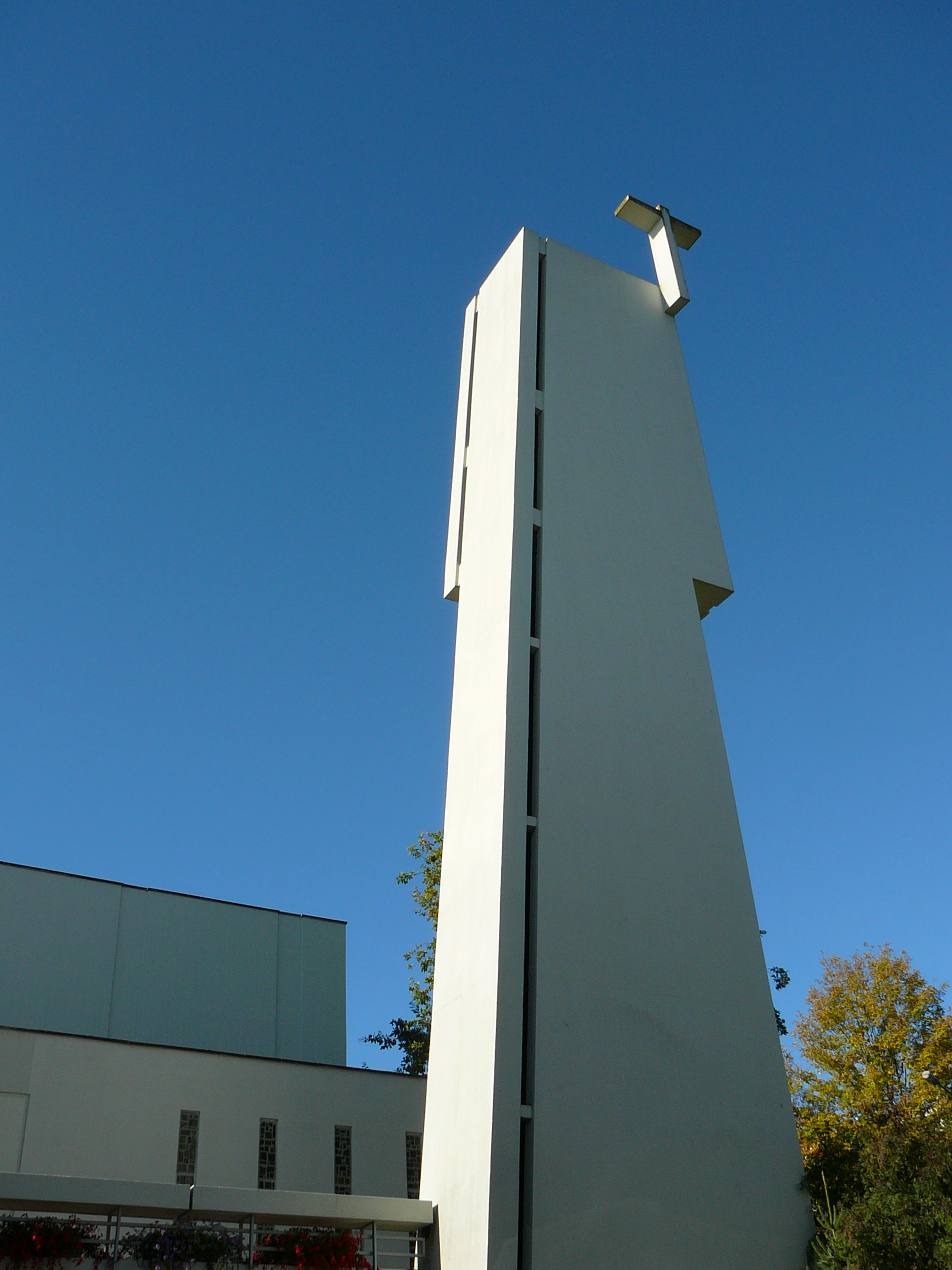 Römisch-katholische Pfarrkirche St. Mauritius Oberengstringen, Kirchturm